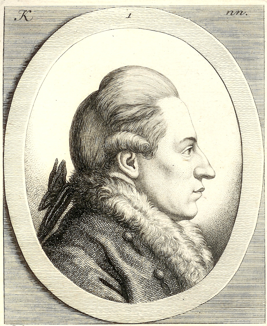 Portrait des Christoph Kaufmann (K.....nn) aus Johann Kaspar Lavaters "Physiognomischen Fragmenten" mit der undeutlich gewordenen Signatur Georg Friedrich Schmolls links unten